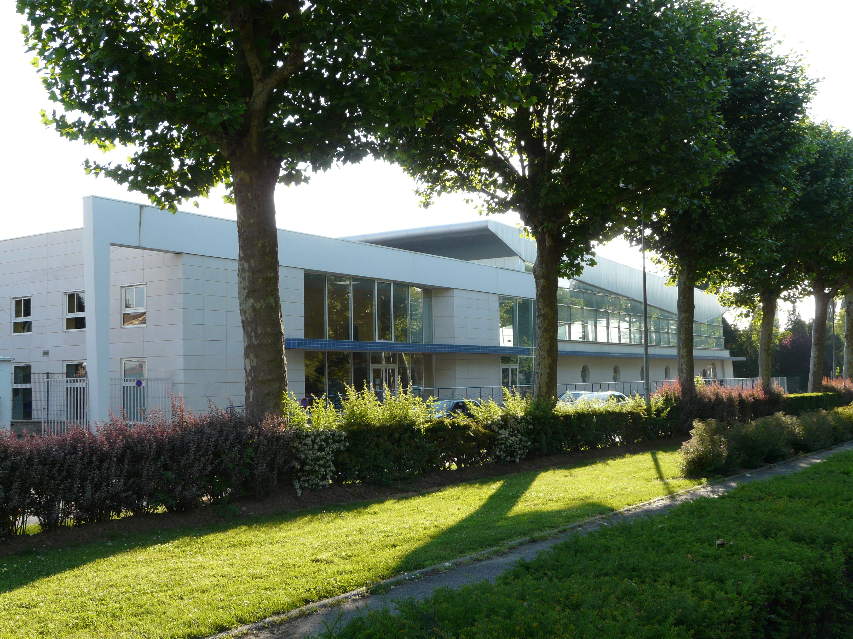 Centre nautique "Liberté", boulevard de la Liberté à cambrai (Nord, France)